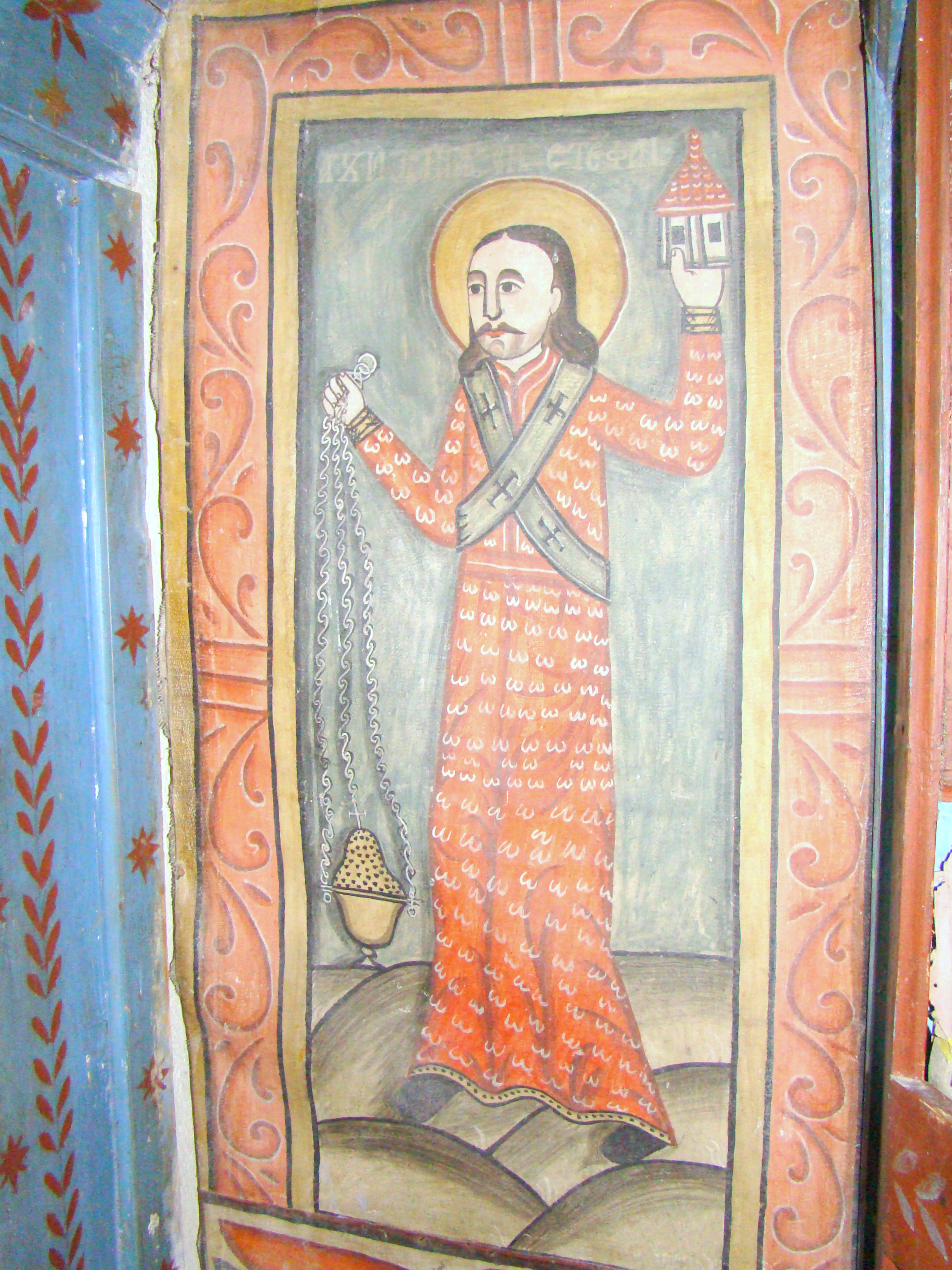 Biserica de lemn „Sf.Arhangheli” din Boiereni, județul Maramureș